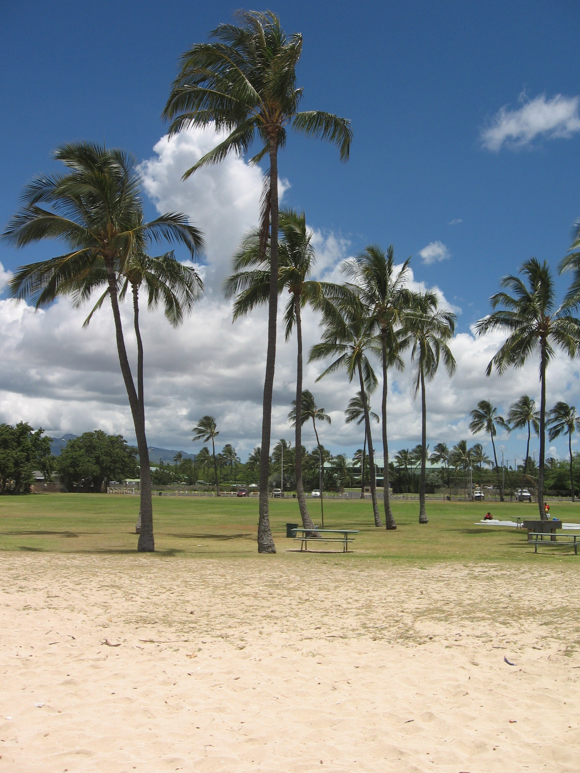 Ewa Beach Hawaii